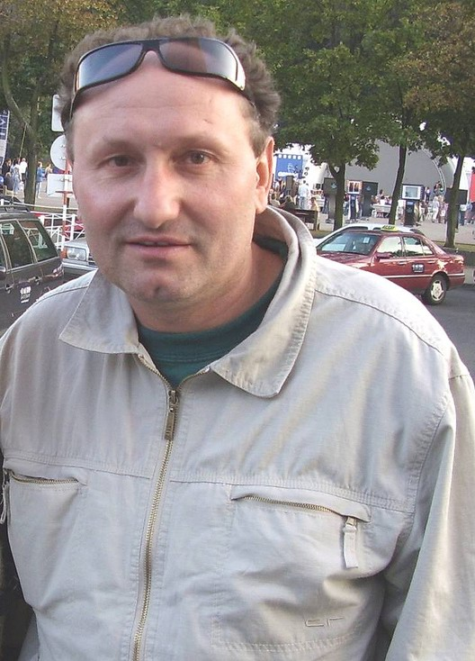 Artur Więcek (ur. 10 maja 1967) - polski reżyser i scenarzysta filmowy.